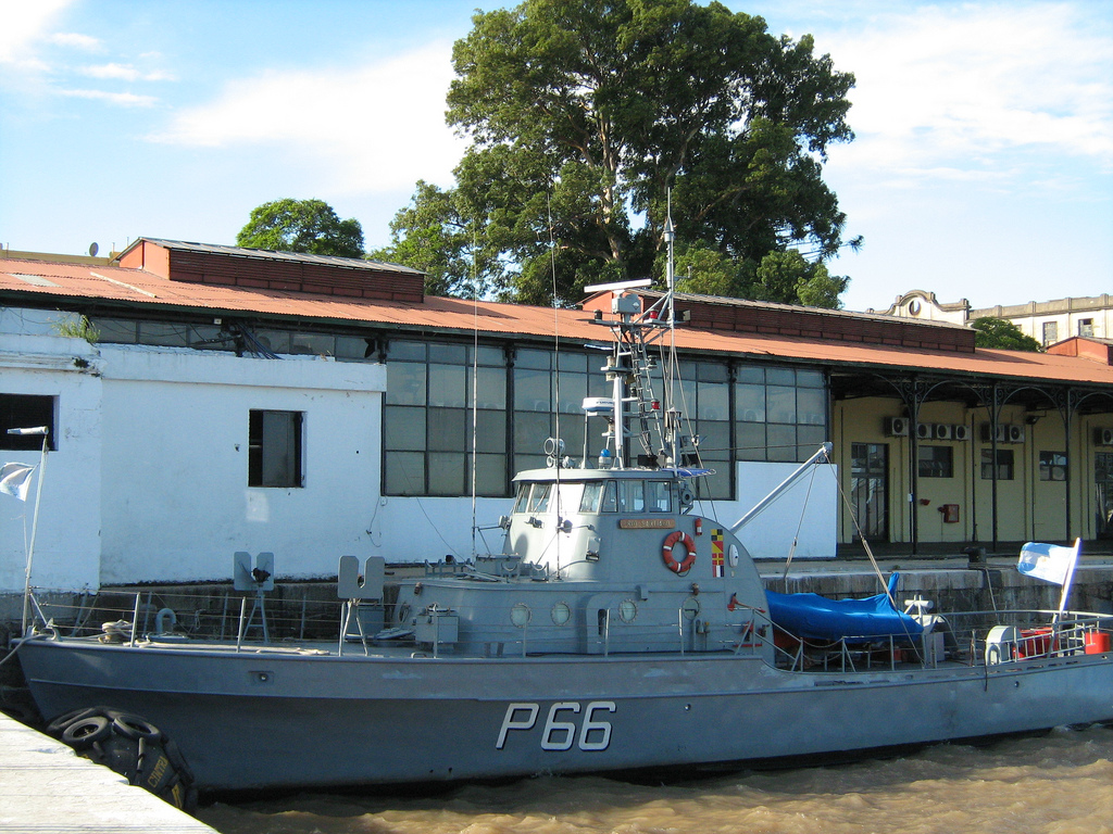 ARA Río Santiago, Buenos Aires, 2011.